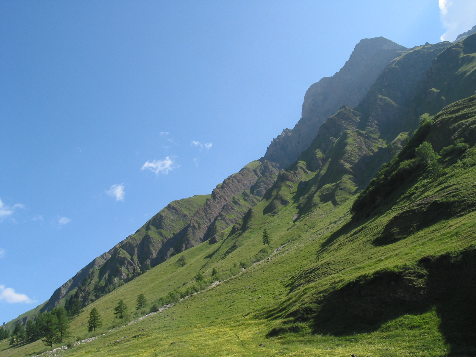 Versant sud-est du Val Ferret au dessus du village de Ferret.